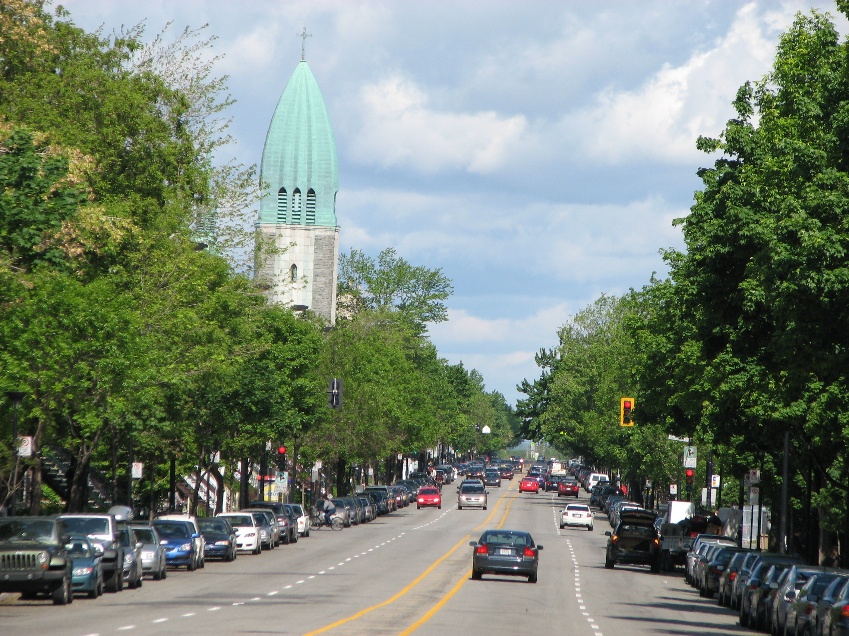 Rue Christophe-Colomb à Montréal